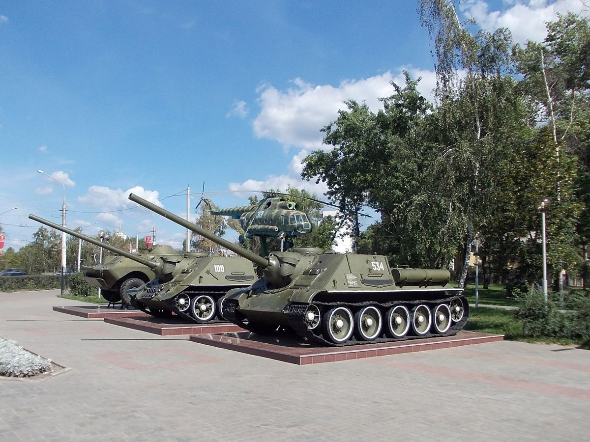 Военная техника в парке патриотов (Воронеж)